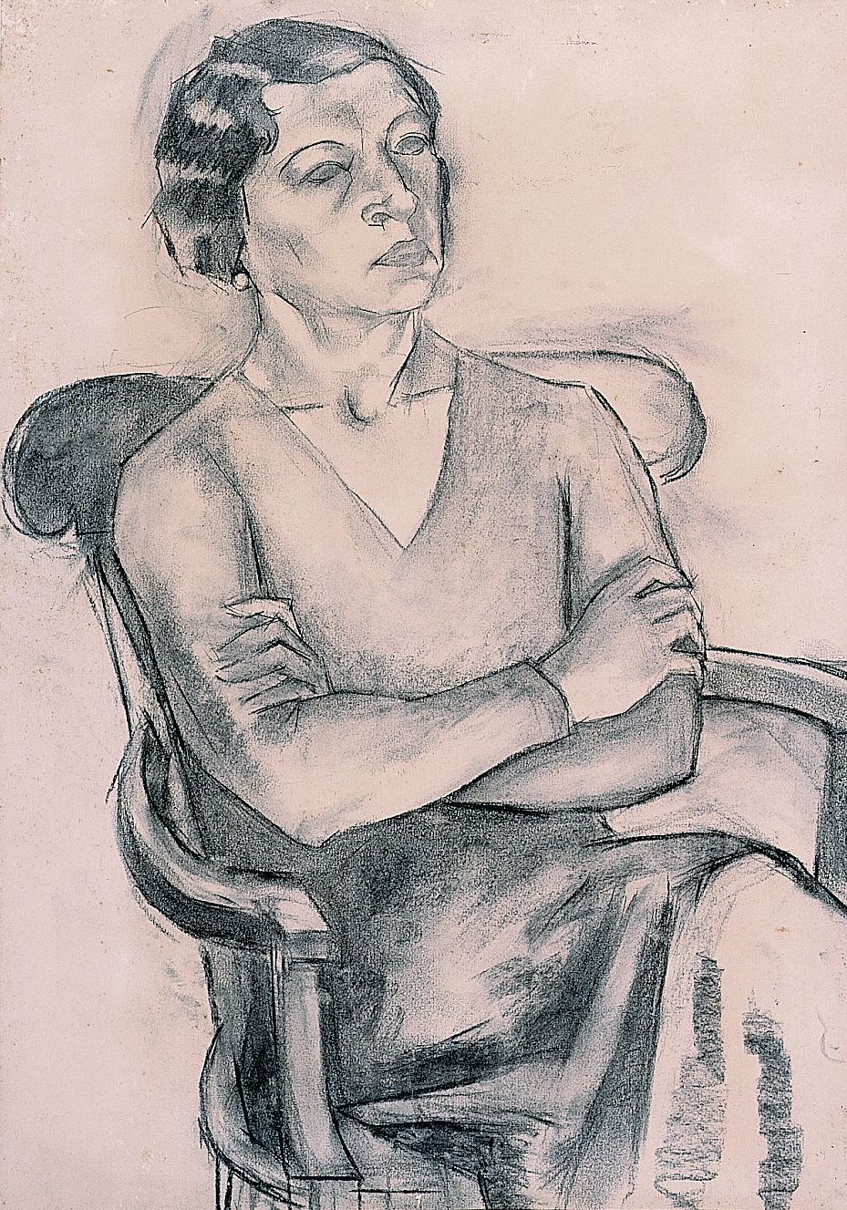 Dibuix de Totote